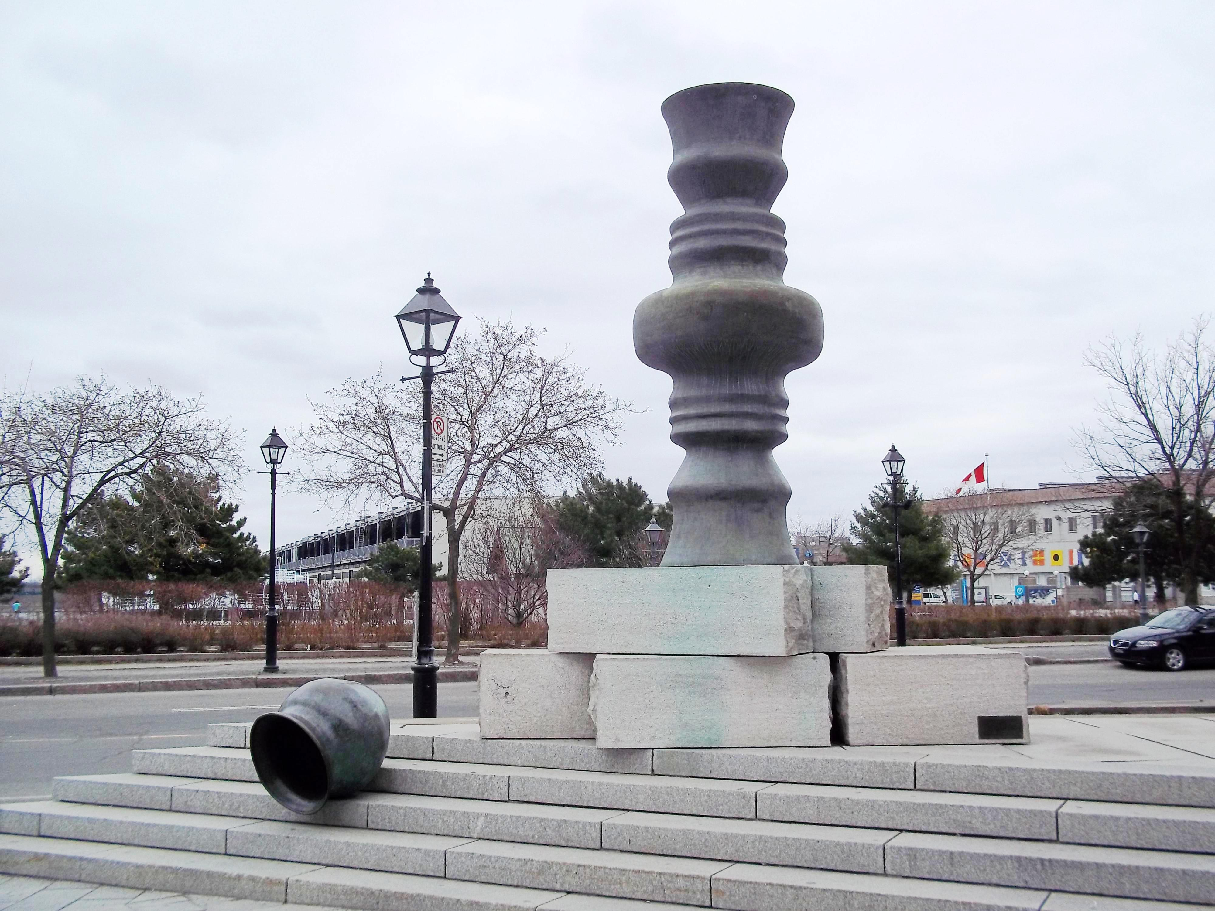 Entre Nous, sculpture de Andrew Dutkewych de 1992, située près de l'Éperon de Pointe-à-Callière, Montréal